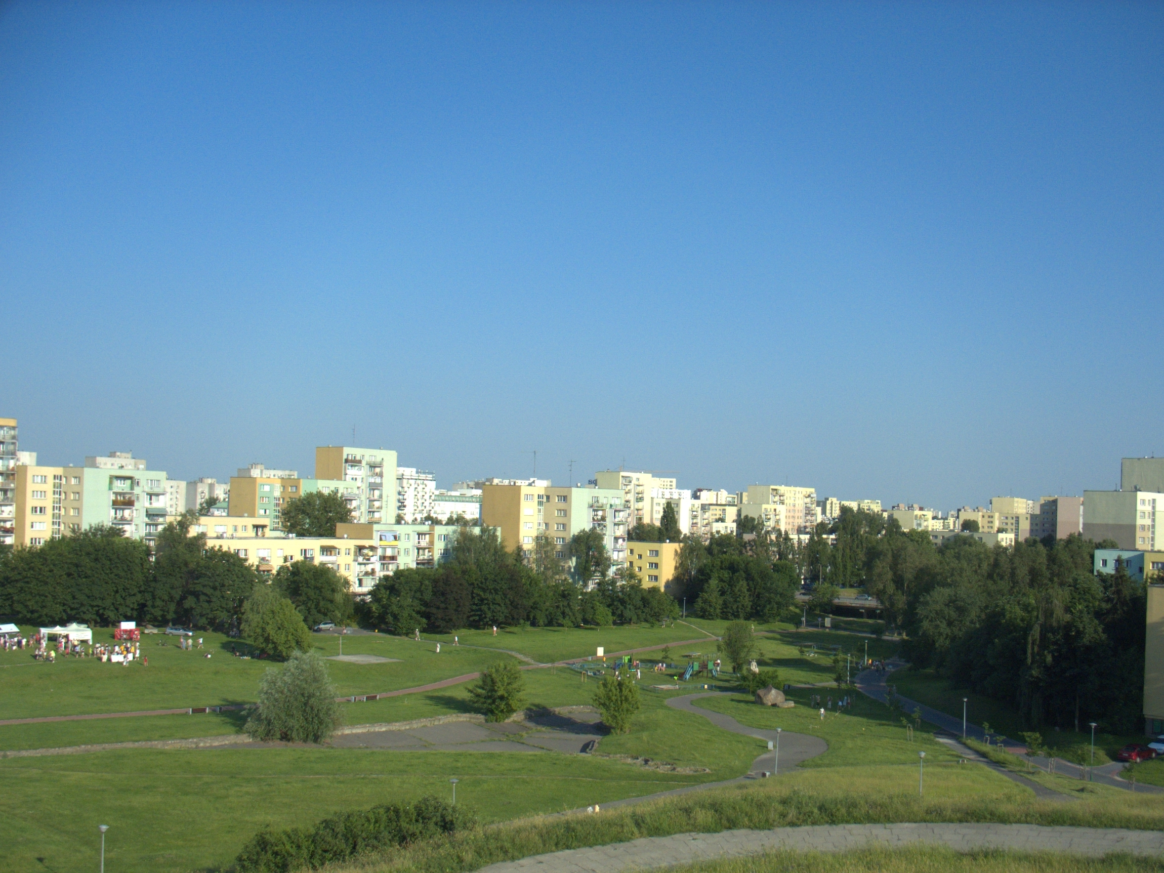 Widok z Kopy Cwila w Warszawie w kierunku Ursynowa